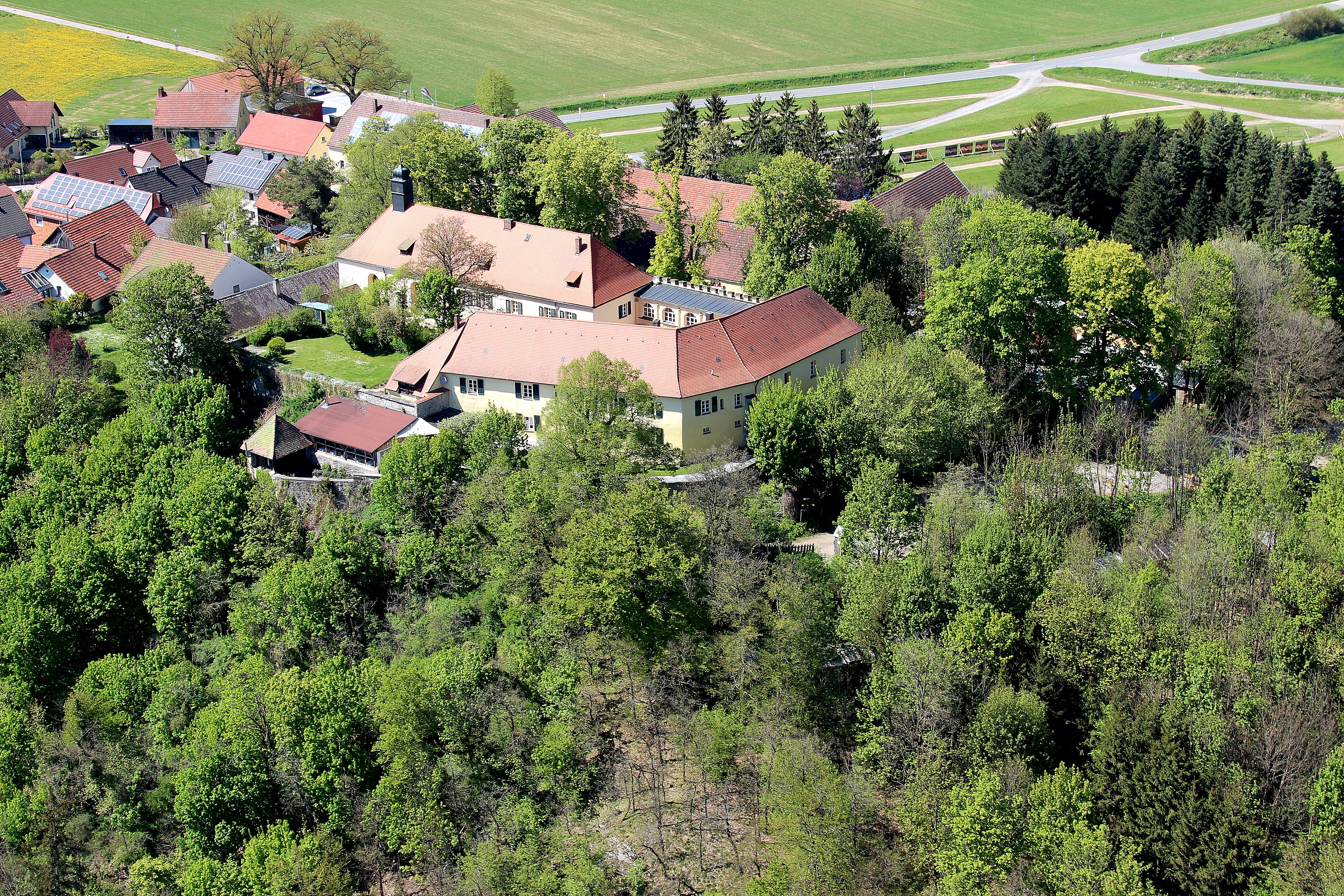 Schloss Guteneck, Gemeinde Guteneck, Landkreis Schwandorf, Oberpfalz, Bayern